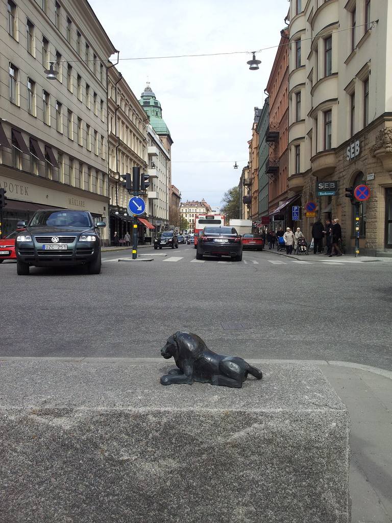 Litet lejon av Monika Masser (2008) på Kungsholmstorg i Stockholm. I bakgrunden Scheelegatan.